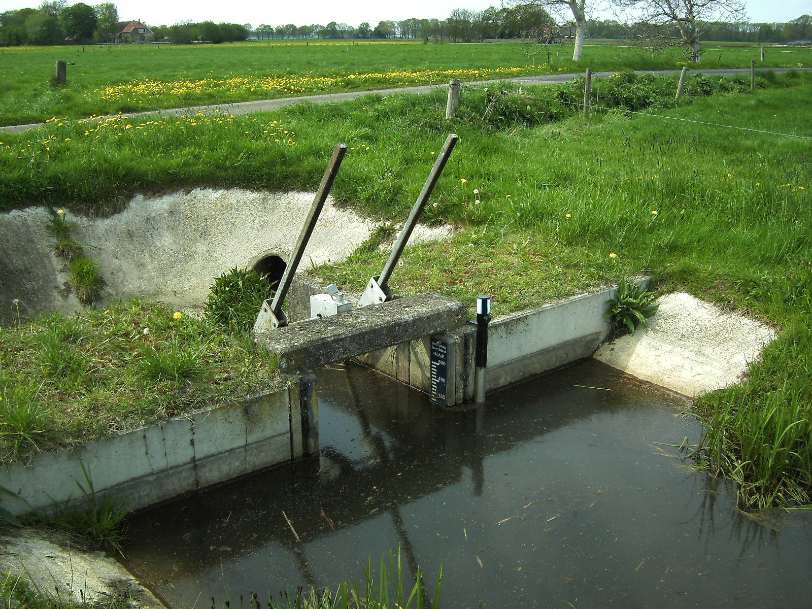 Stuw in de Averlosche Leide die bij de reconstructie na 2012 vervangen zal worden door een visvriendelijke voorziening.